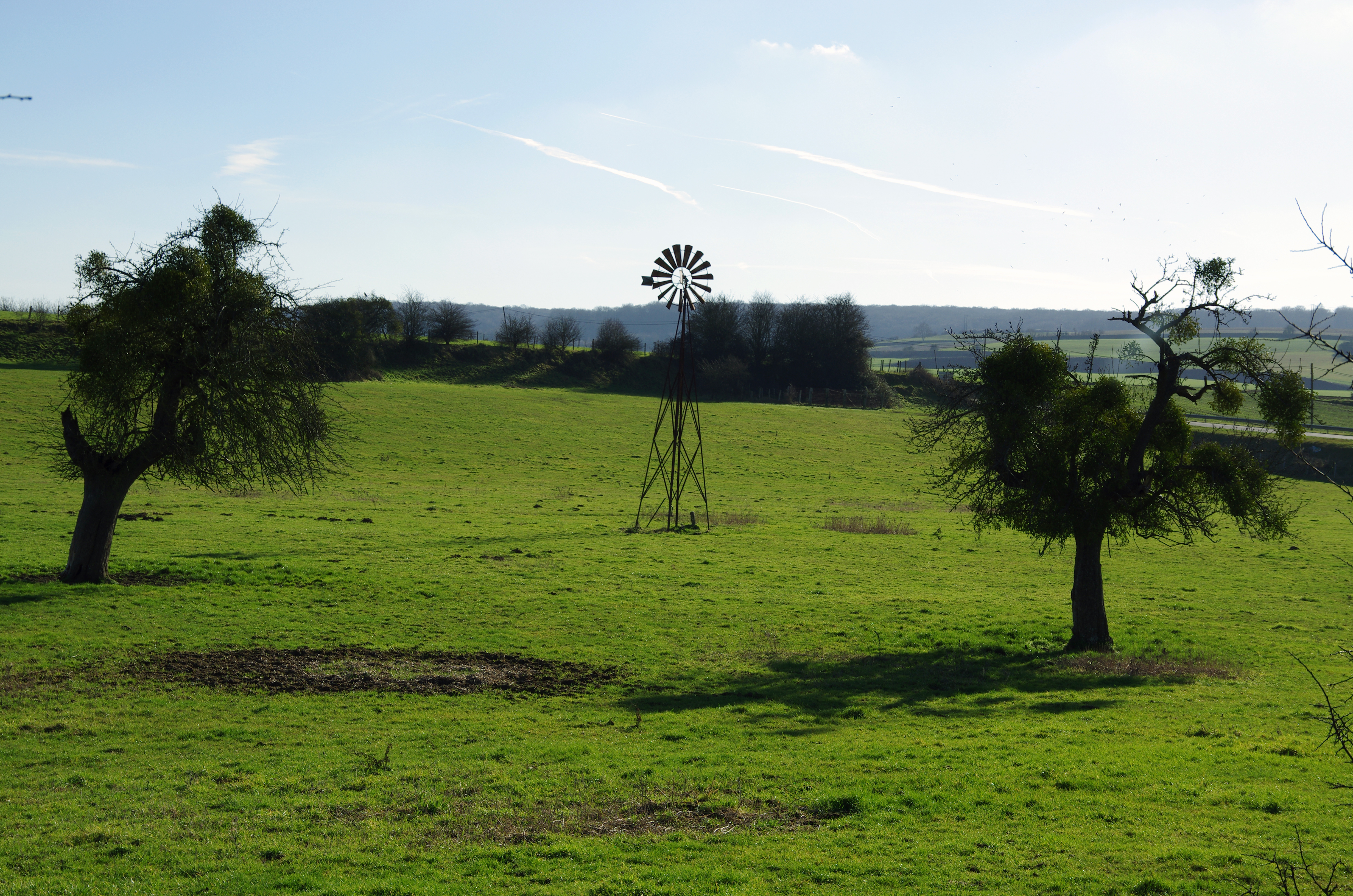 Monchaux-Soreng (Seine-Maritime, France) - Éolienne entre 2 pommiers.